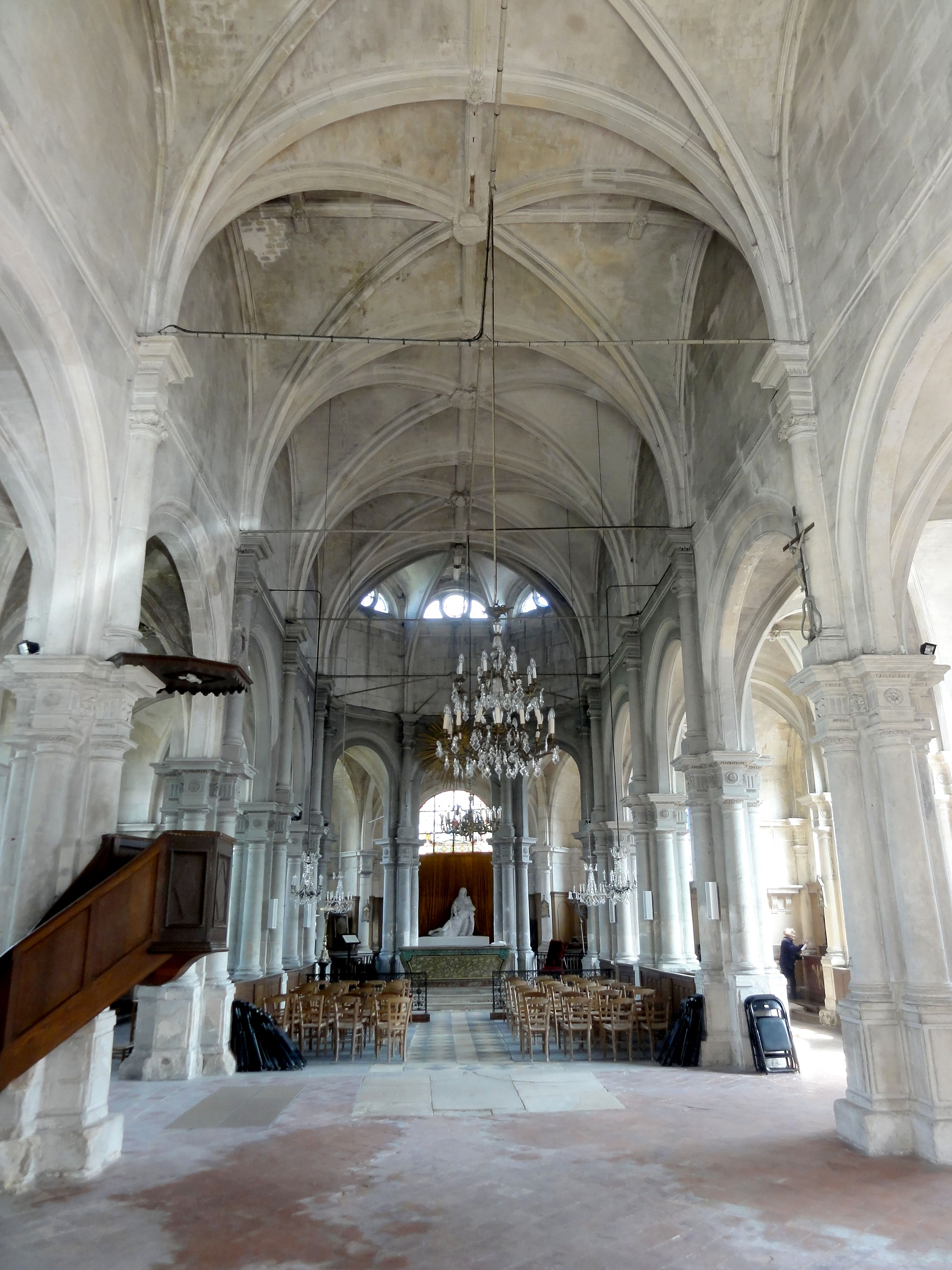 Nef, vue vers l'est nef, vue vers l'est.